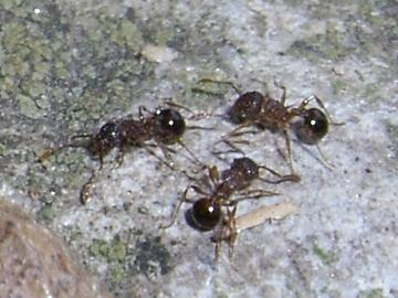 Pristomyrmex pungens (アミメアリ), Nagasaki(長崎県長崎市)